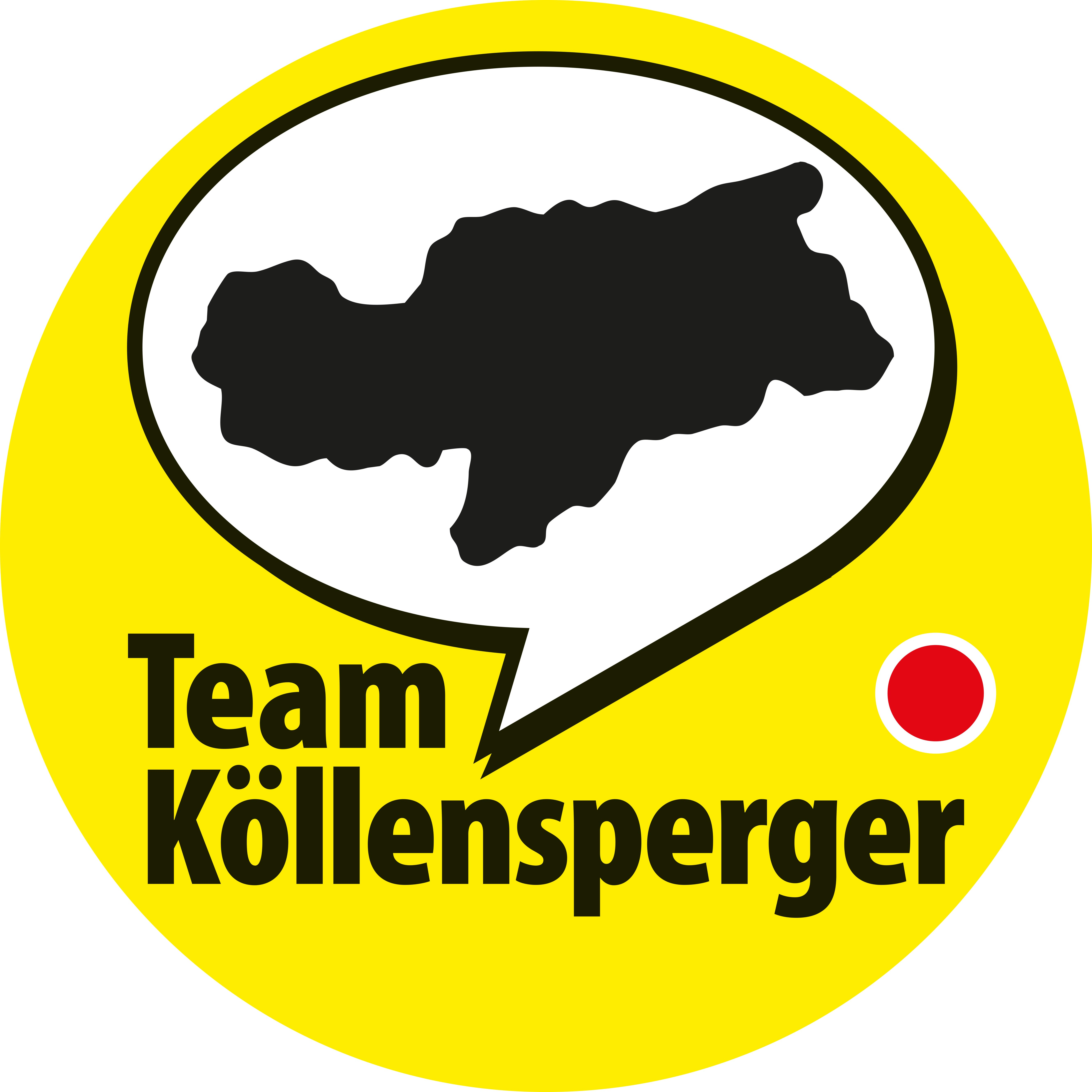 logo del movimento